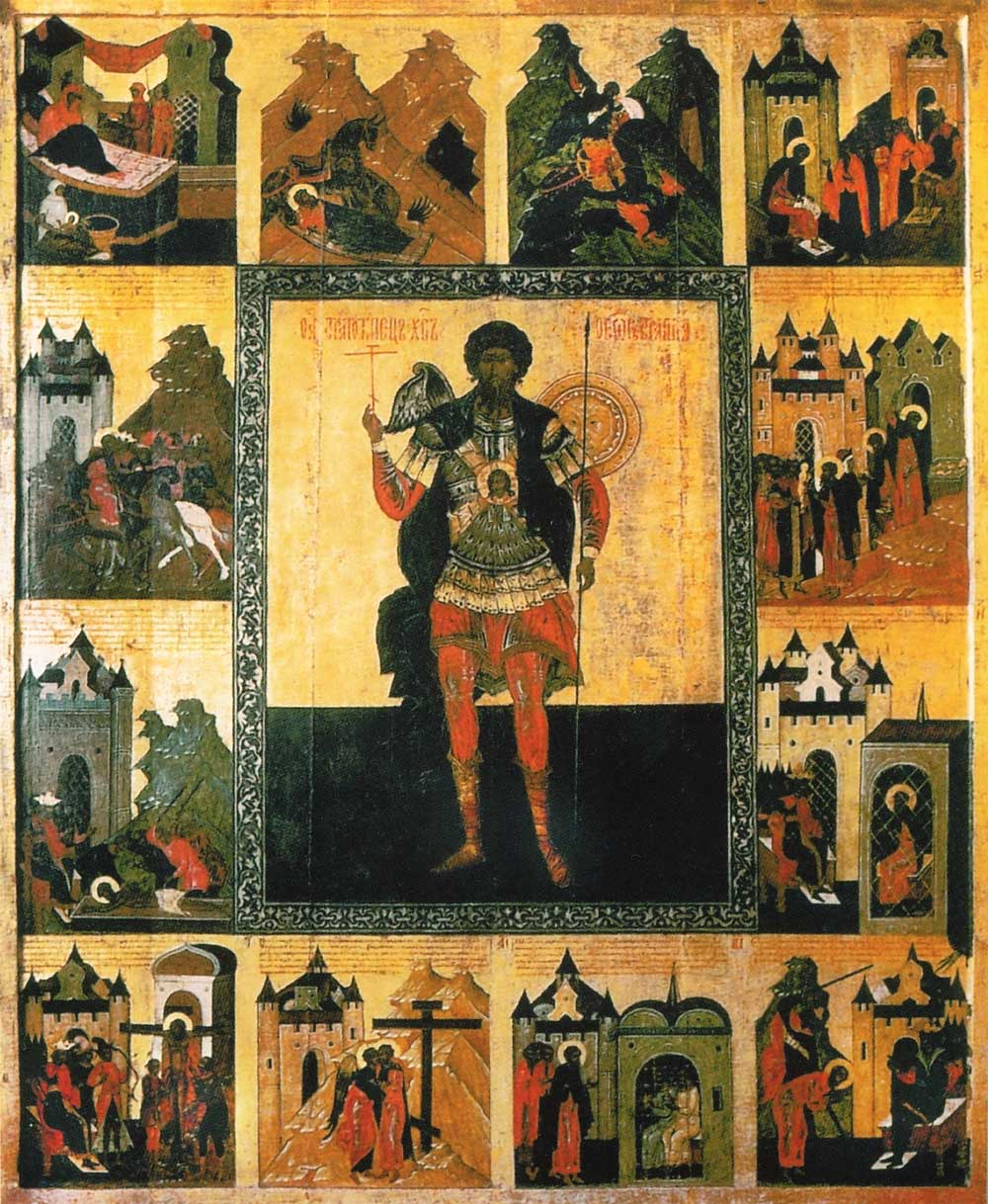 Феодор Стратилат в житии Школа или худ. центр: Псков 1570-е годы Церковь св. Марии и Христофора, Кальбенштайнберг, Германия